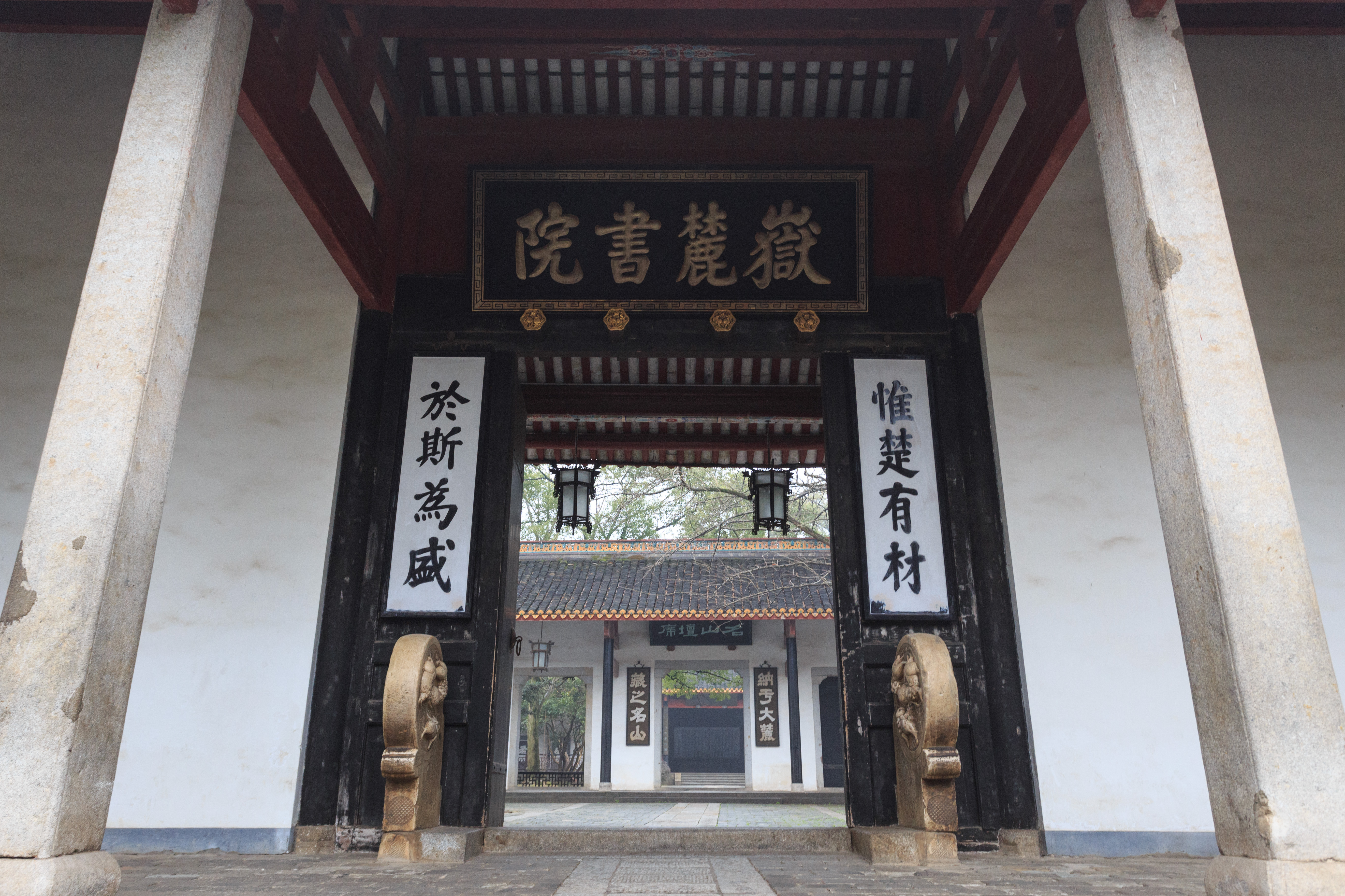 嶽麓書院 大門